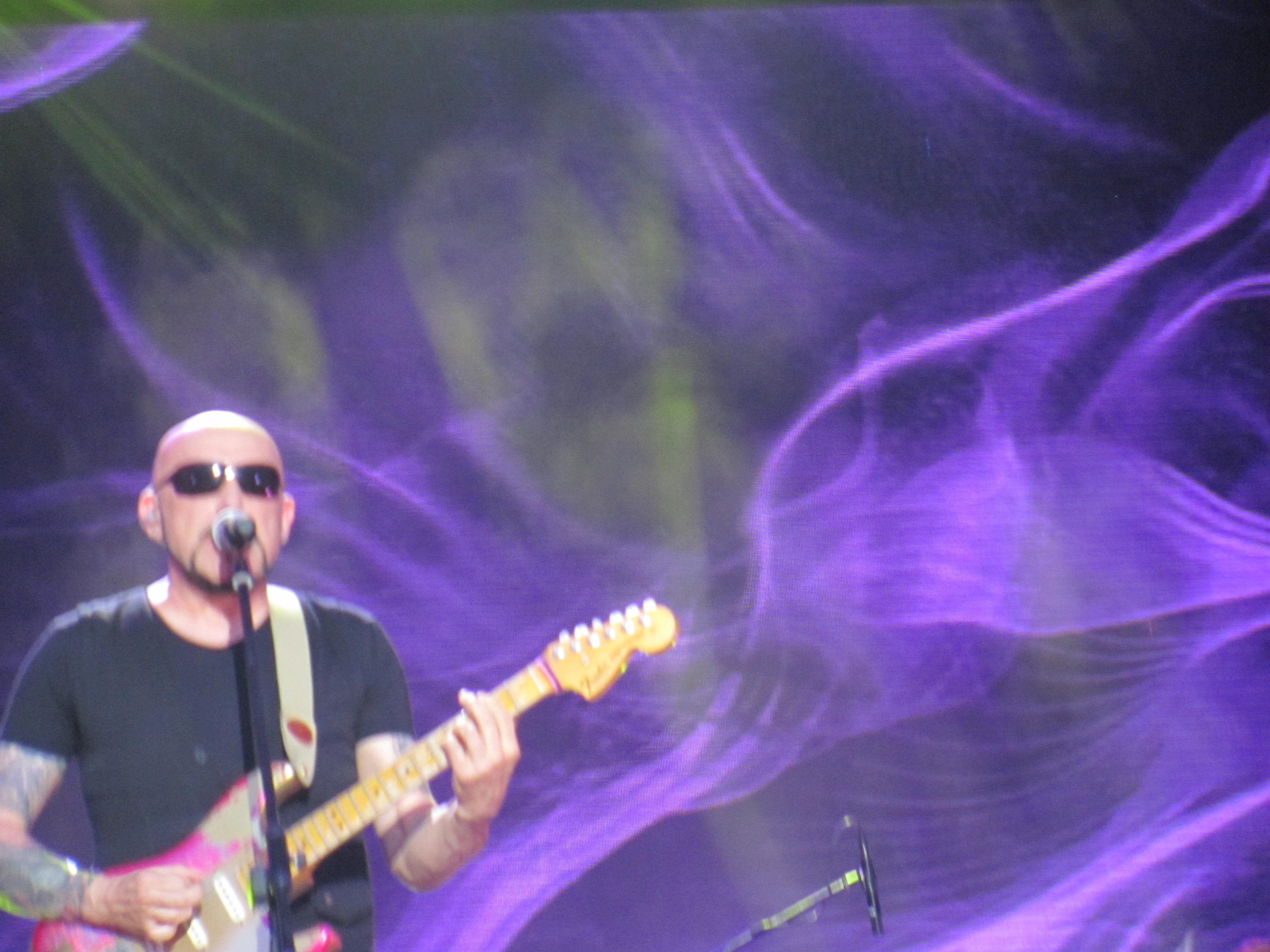 Grzegorz Skawiński (Kombii). Koncert Lato Zet i Dwojki 2014 w Toruniu